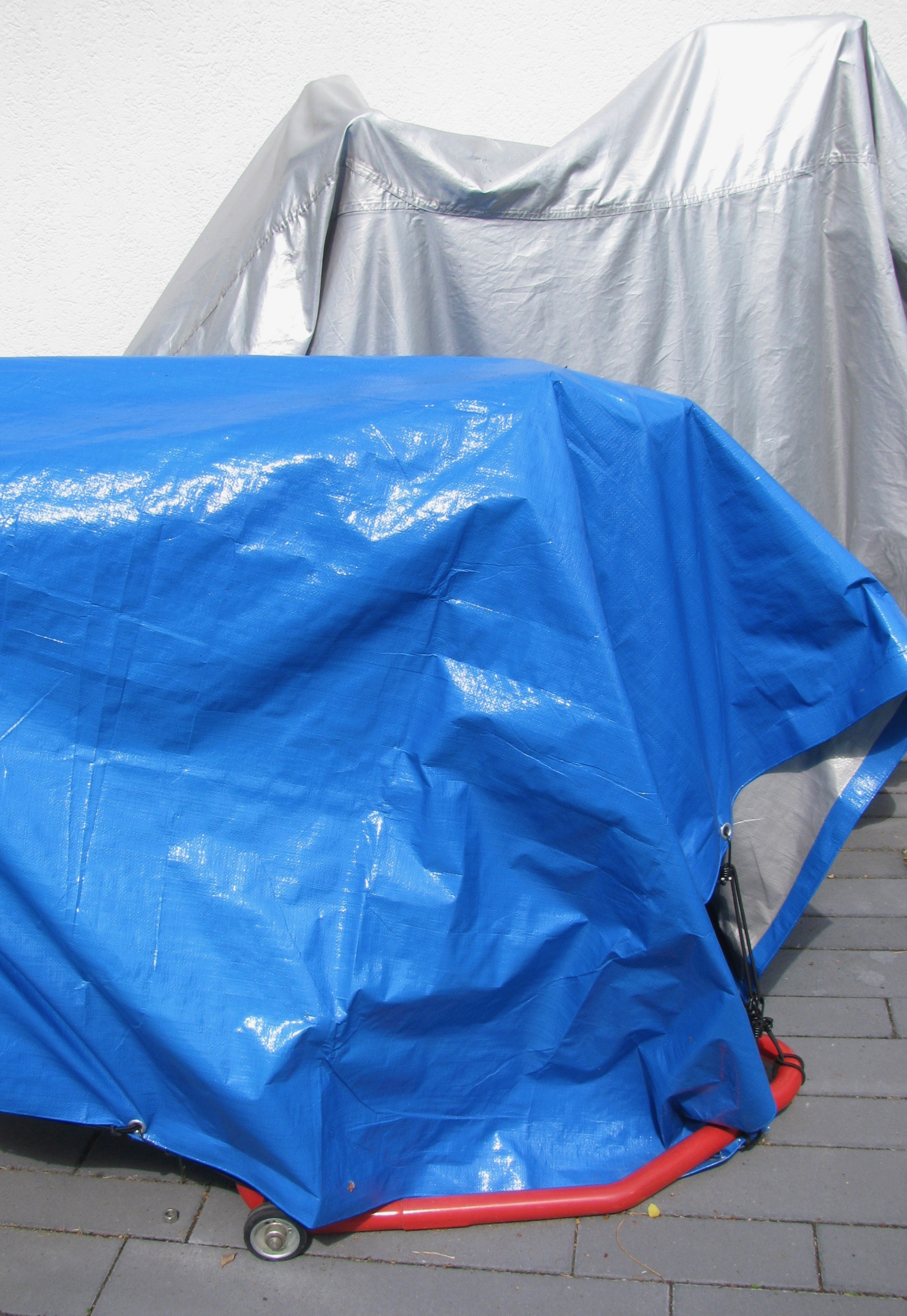 Die Fotografie zeigt Plastikabdeckungen für Zweiräder in Grau und Blau vor einem Haus. Das leuchtende Blau und Rot neben den Grautönen der Wand, des Bodens und der hinteren Abdeckung ergeben einen deutlichen Qualitätskontrast.